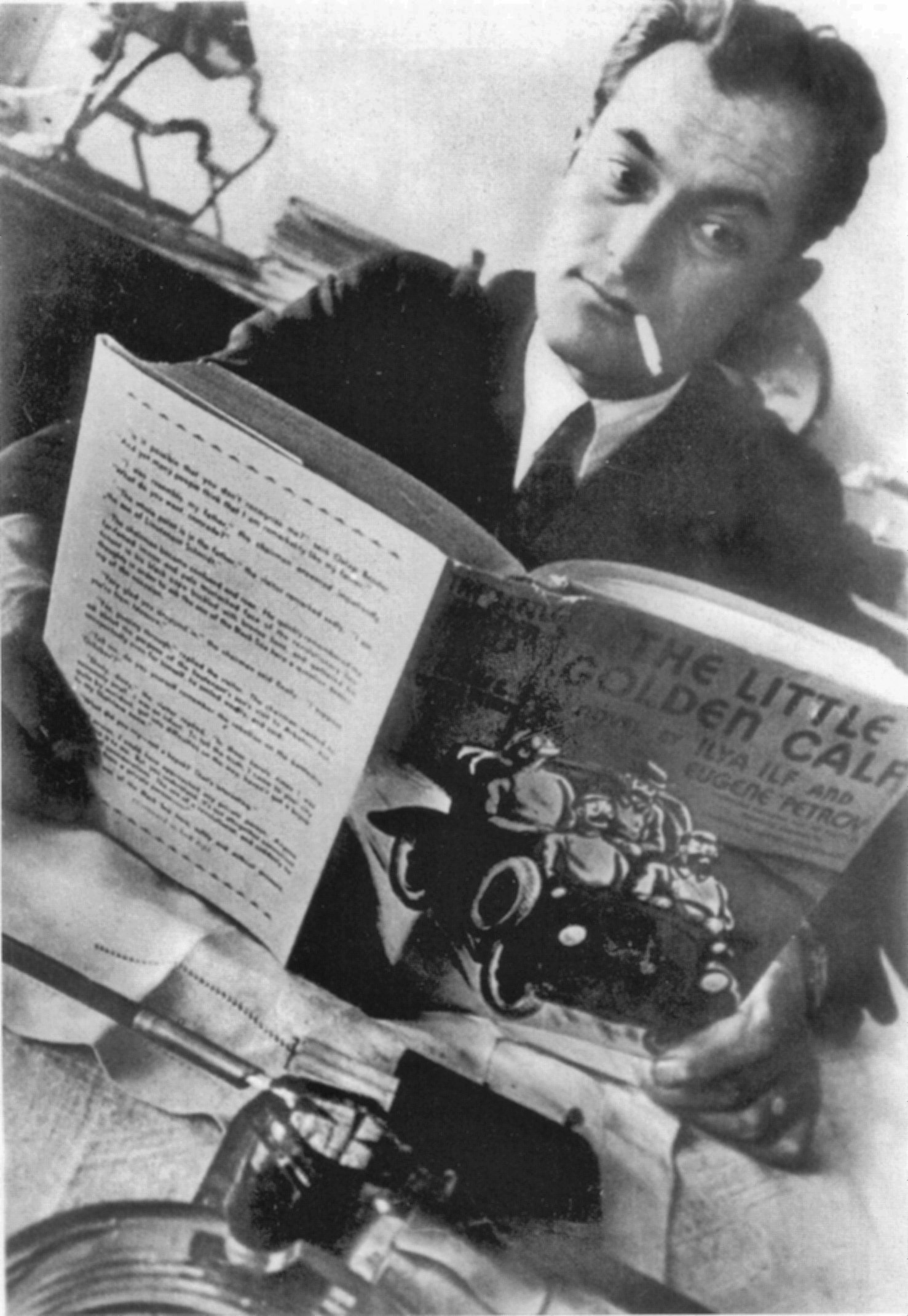 Евгений Петров читает роман "Золотой телёнок" в английском переводе